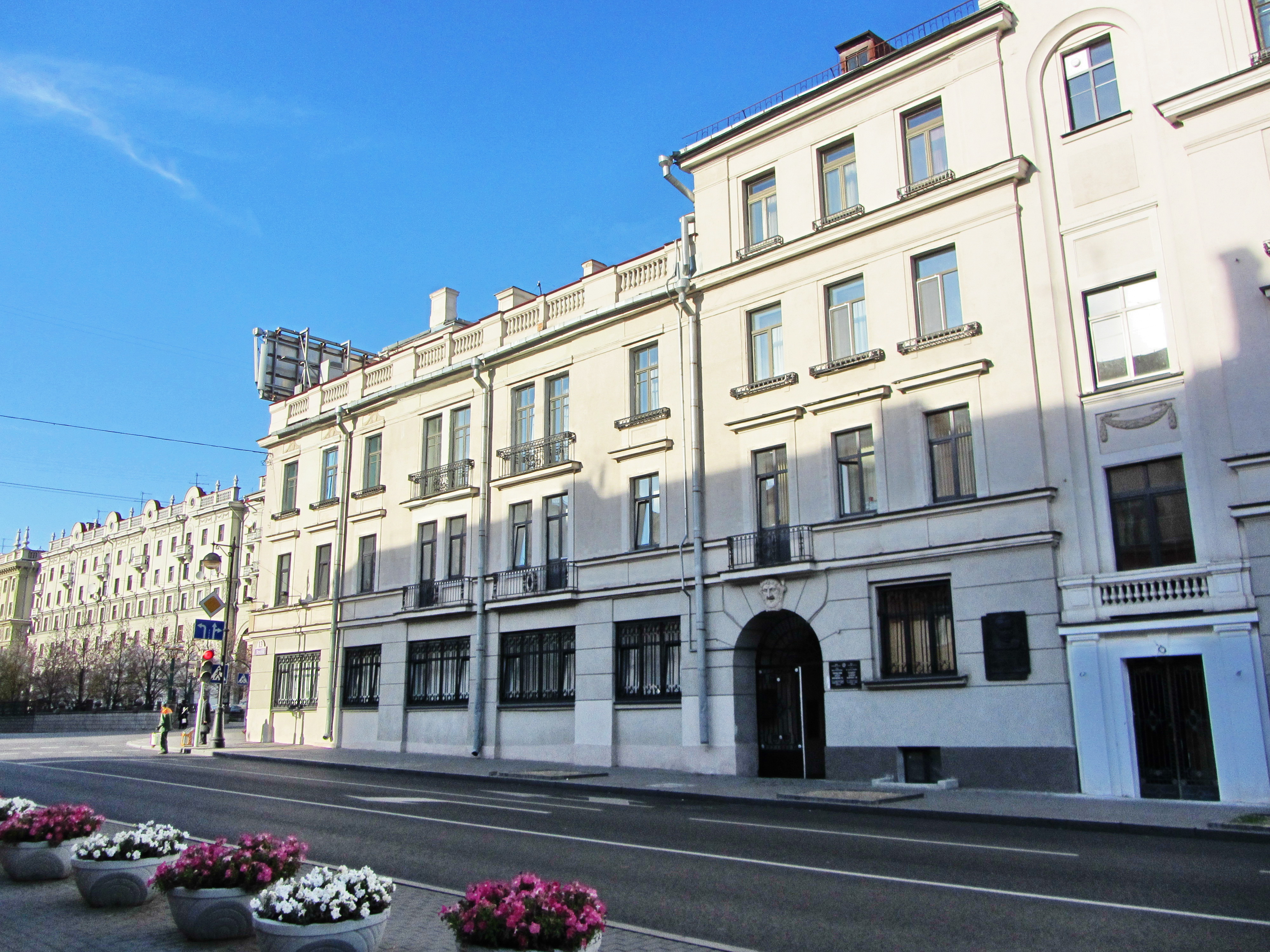 Беларуская (тарашкевіца): Дом Сьвянціцкага, Менск. Бакавы фасад.